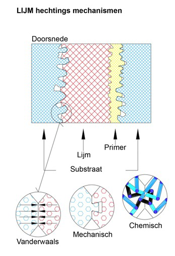 Visualisatie van de lijm hechtingsmechanismen. sept. 2005 Laurens van Lieshout